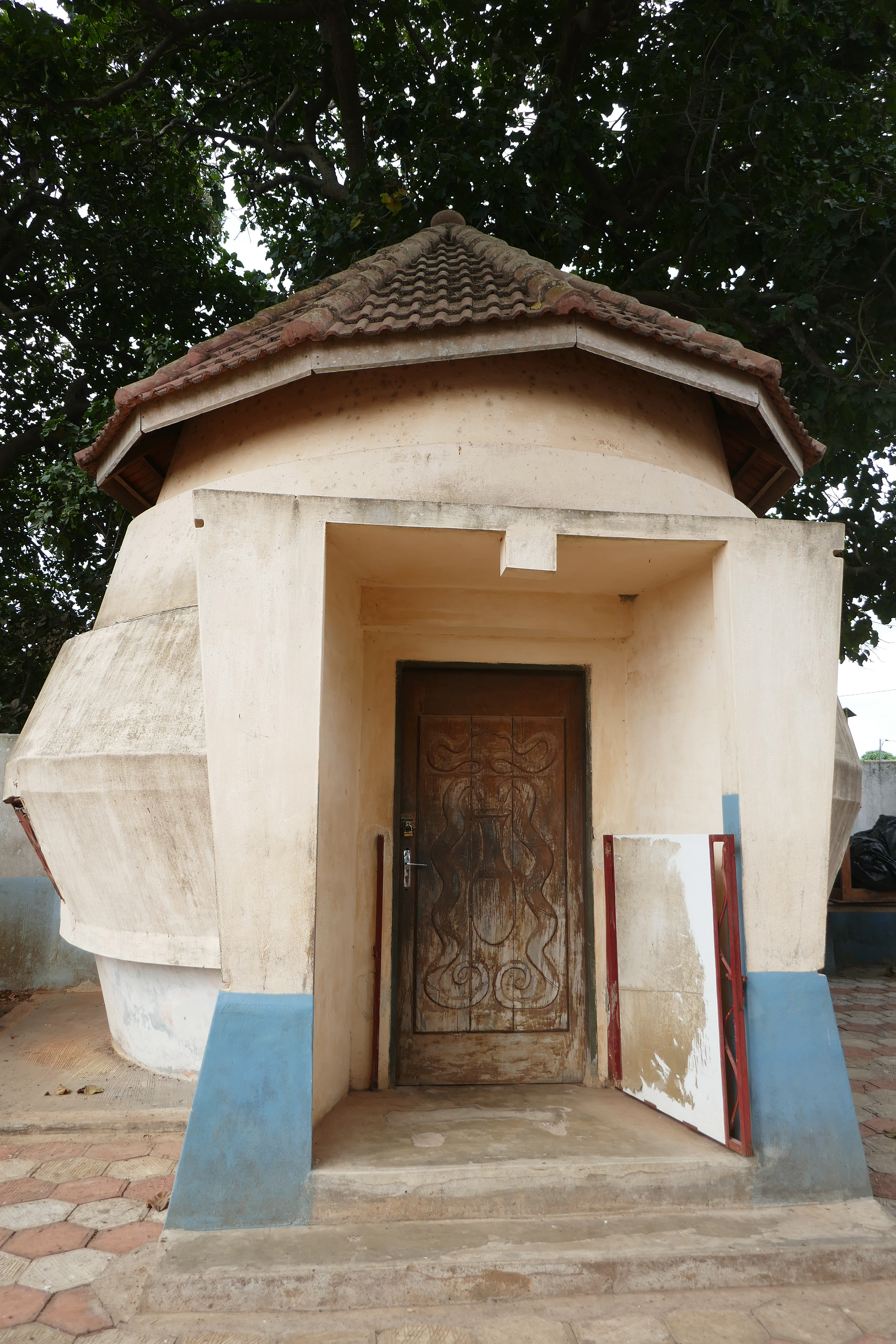 Temple des Pythons (Ouidah, Bénin) : bâtiment en forme de cône tronqué, en parpaings de ciment, abritant les pythons vivants.